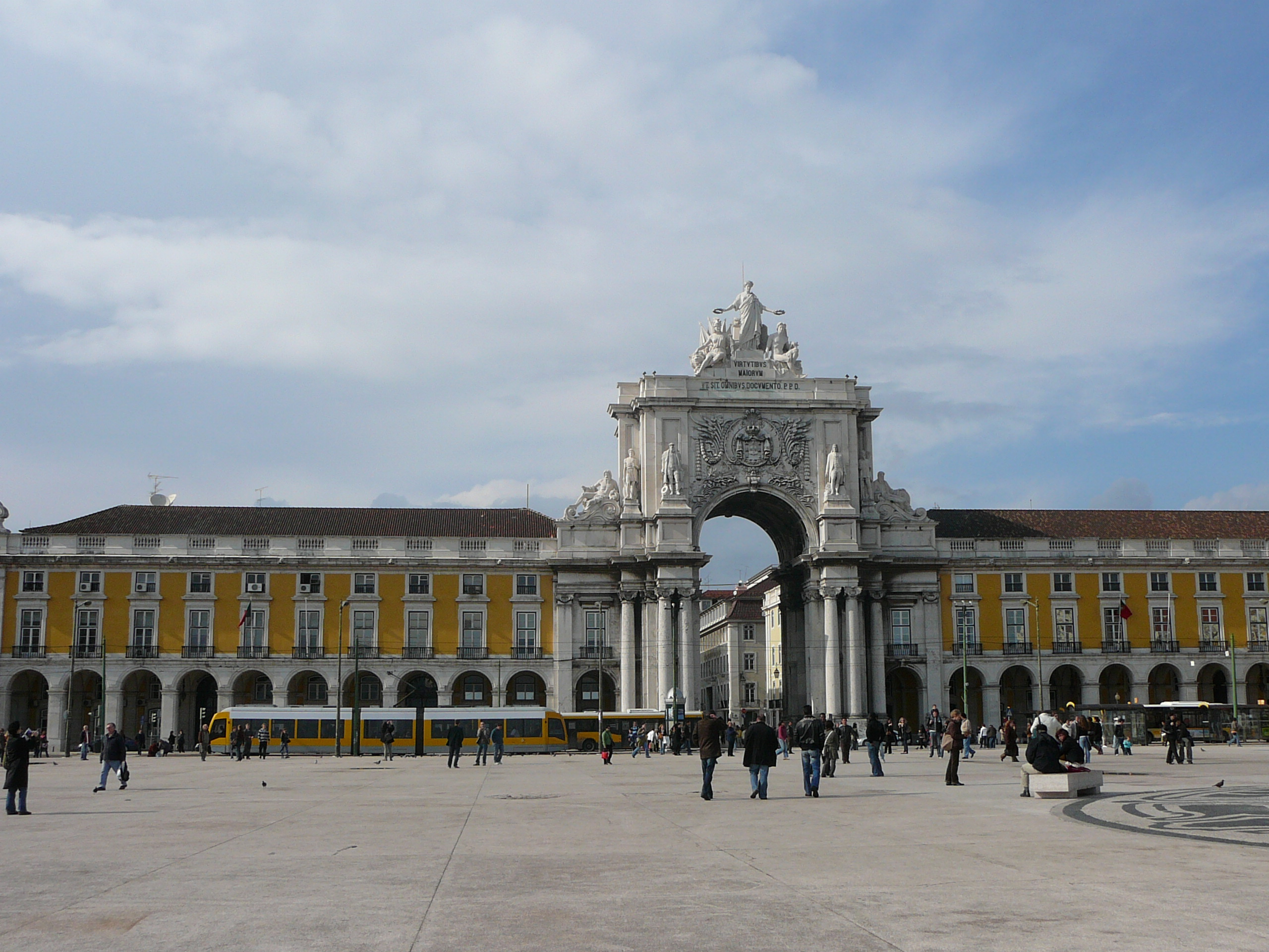 Namestie Praca do Comercio, Lisabon